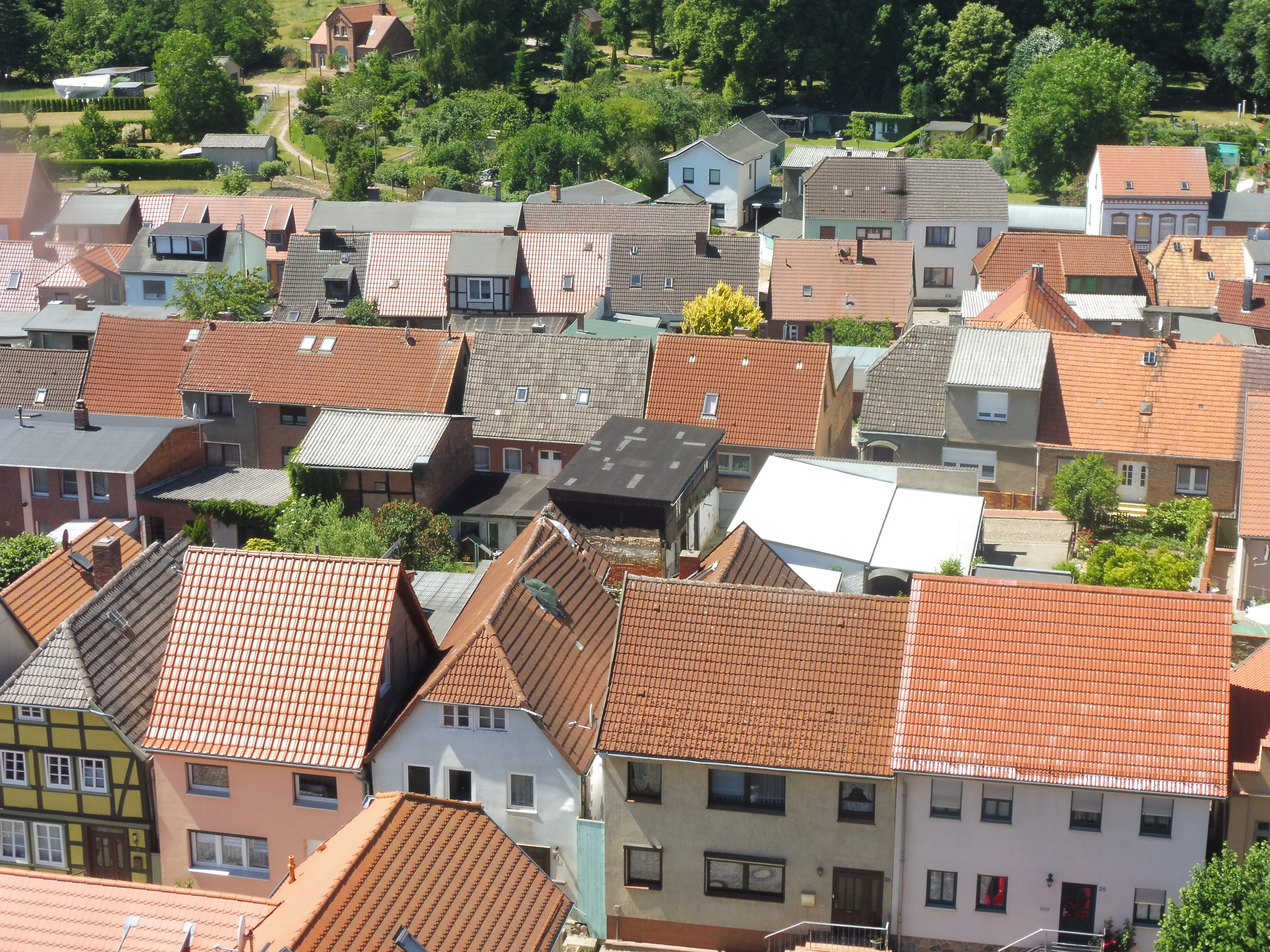 Westliche Altstadt von Plau am See zwischen der Marienkirche und dem Friedhof